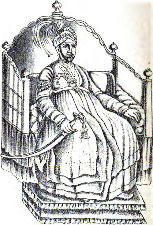 Uthradom Thirunal Marthanda Vurmah Maha Rajah